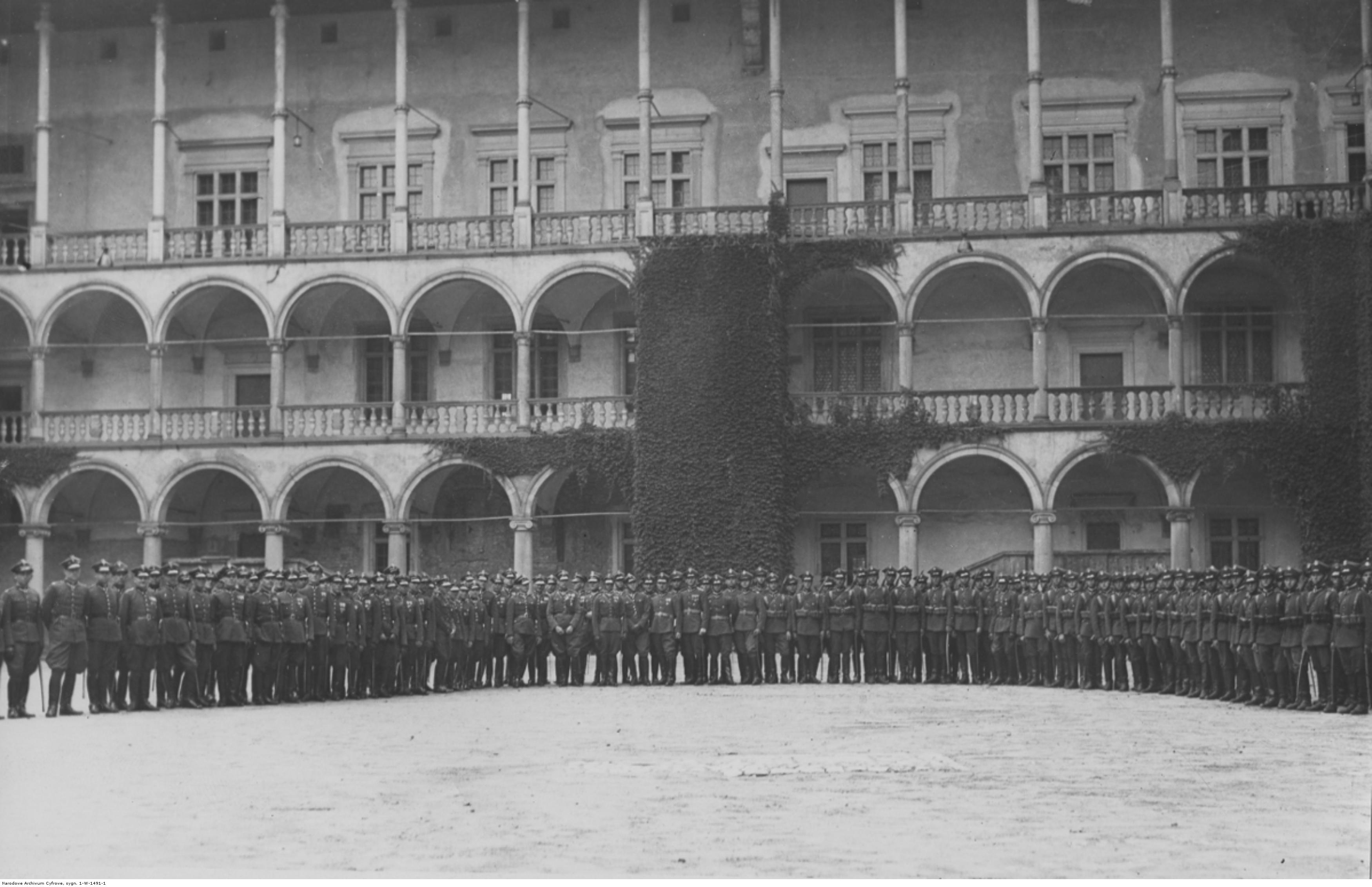 4 Pułk Artylerii Lekkiej z Inowrocławia na Wawelu; lipiec 1936 r. Fotografia grupowa artylerzystów z 4 pal w Inowrocławiu przed złożeniem wieńca na sarkofagu Marszałka Józefa Piłsudskiego. Wśród uczestników wycieczki widoczny major Leon Sulkiewicz. Koncern Ilustrowany Kurier Codzienny - Archiwum Ilustracji. Sygnatura: 1-W-1491-1